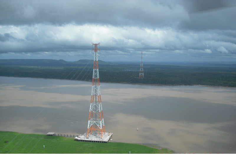 Torres 238 e 241 em Almeirin Pará